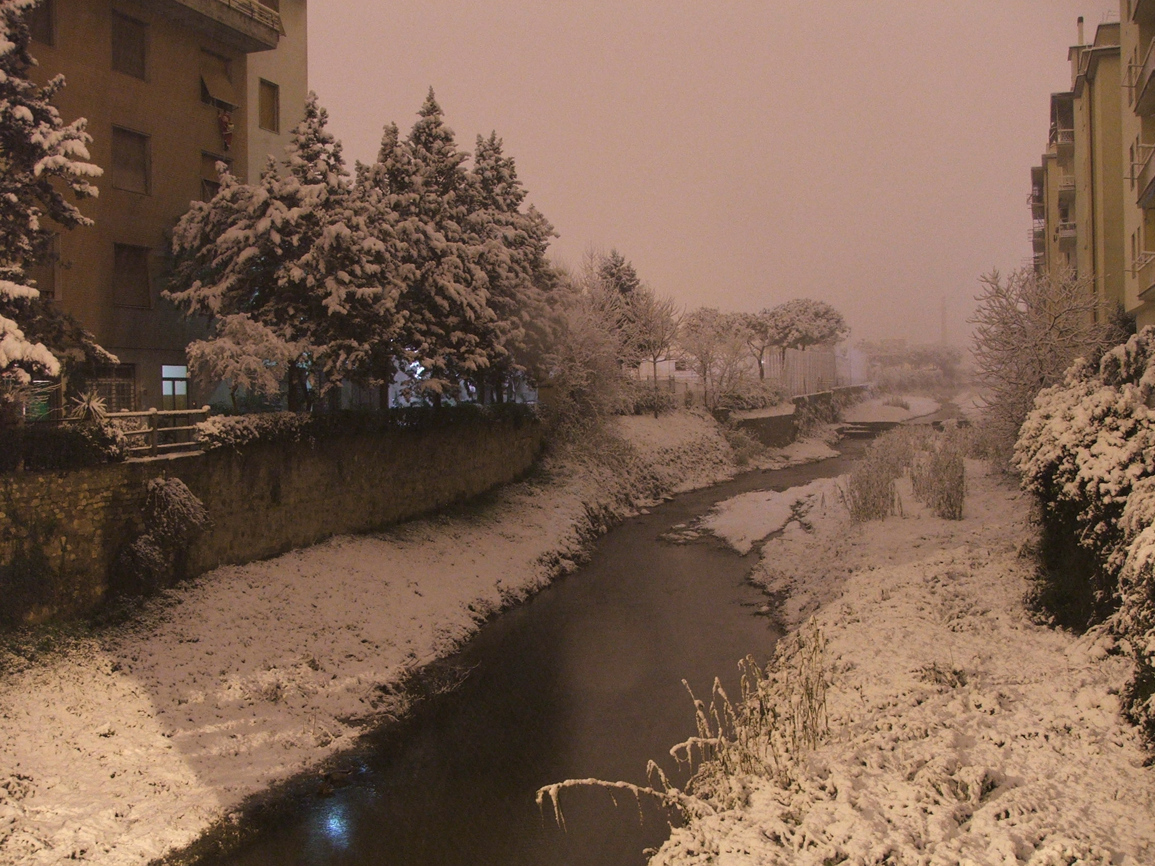 Foto del torrente terzolle. Lavoro personale. Foto del febbraio 2006. Autore: Mage.